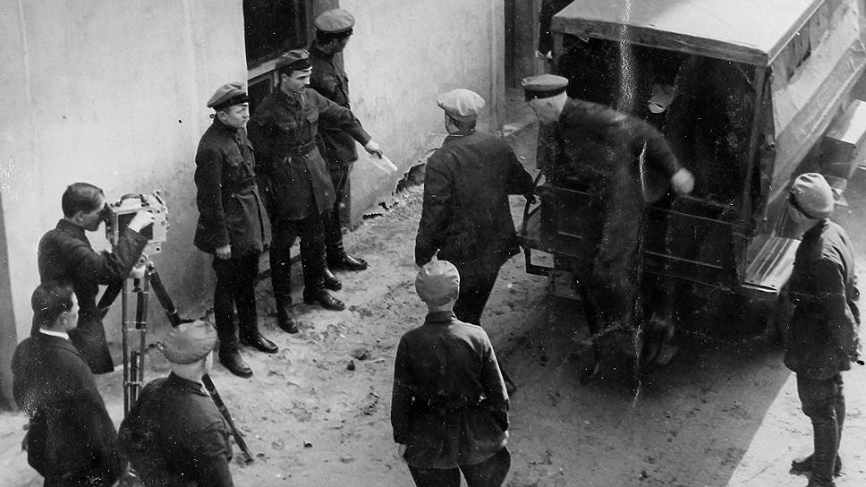 Шахтинское дело - Подсудимых конвоируют сотрудники ОГПУ (1928). Фото: архив журнала «Огонёк»